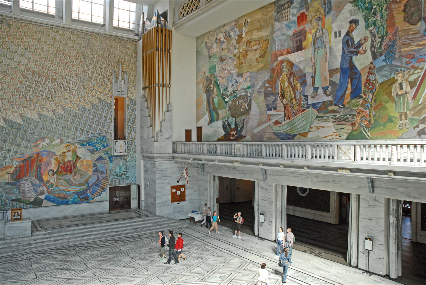 Chaque année, le 10 décembre, se tient dans le grand hall la cérémonie d'attribution du Prix Nobel de la Paix. L'hôtel de ville (Rådhuset) d'Oslo a été inauguré en 1950. Il a été décoré par des artistes norvégiens de la première moitié de 20e siècle, avec des motifs tirés de l'histoire, de la culture et du monde de travail norvégiens. Il a été conçu par les architectes Arnstein Arneberg et Magnus Poulsson, en 1931 dans un style art déco scandinave mais terminé après la guerre en 1950.